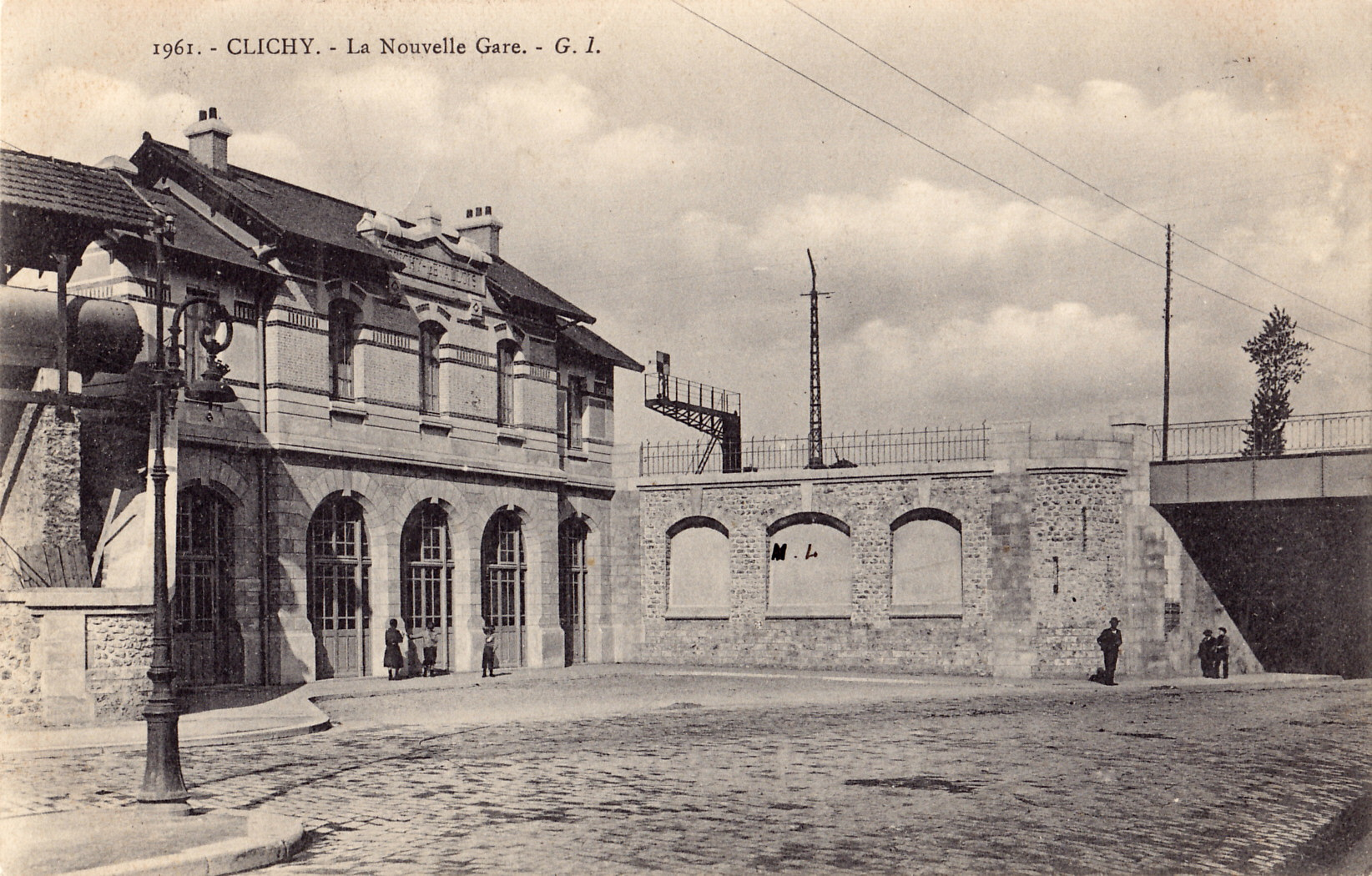 Carte postale ancienne éditée par GI, n°1961 : CLICHY - La nouvelle Gare.